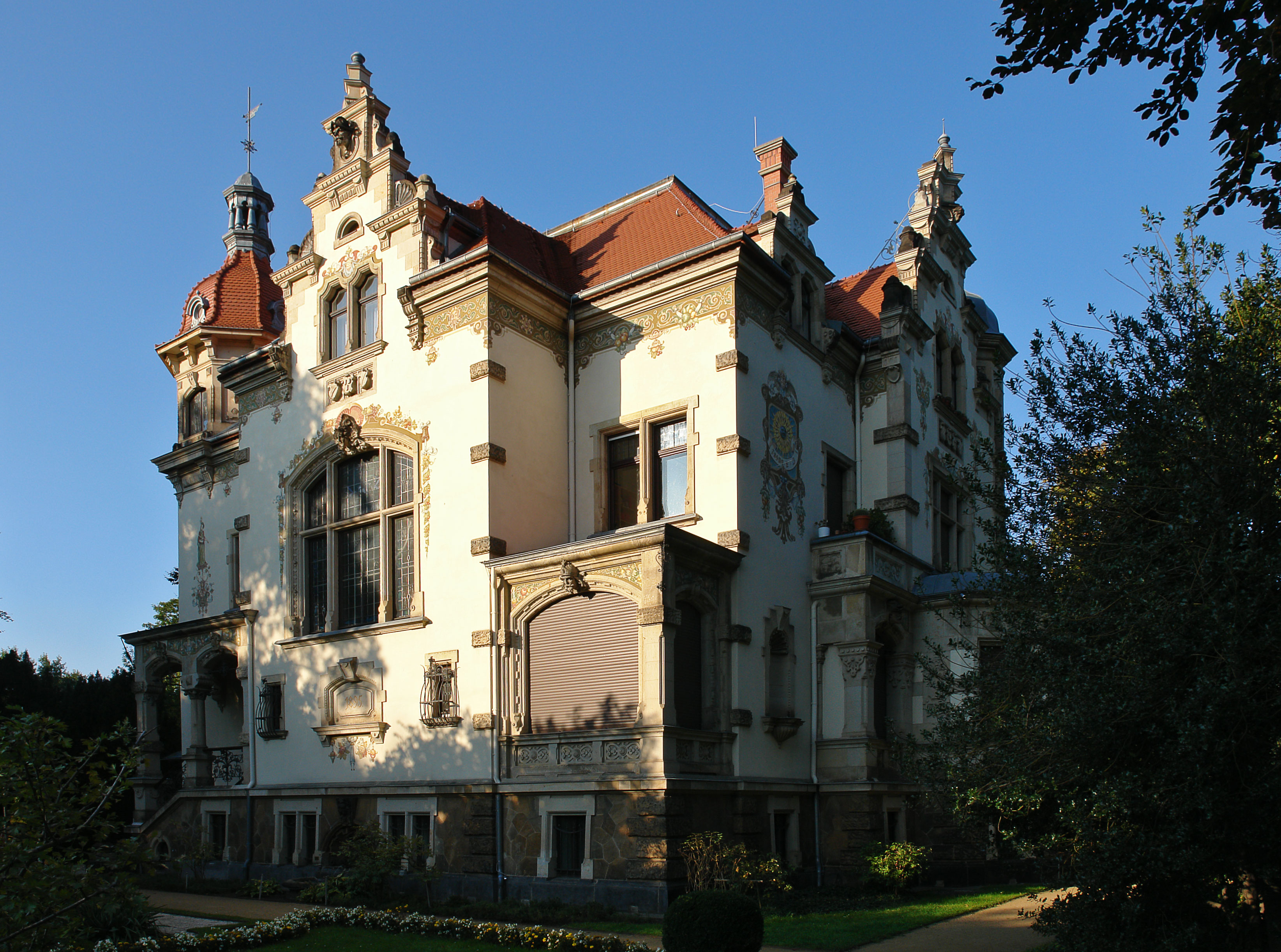 Standesamt Goetheallee Blasewitz; Dresden Deutschland